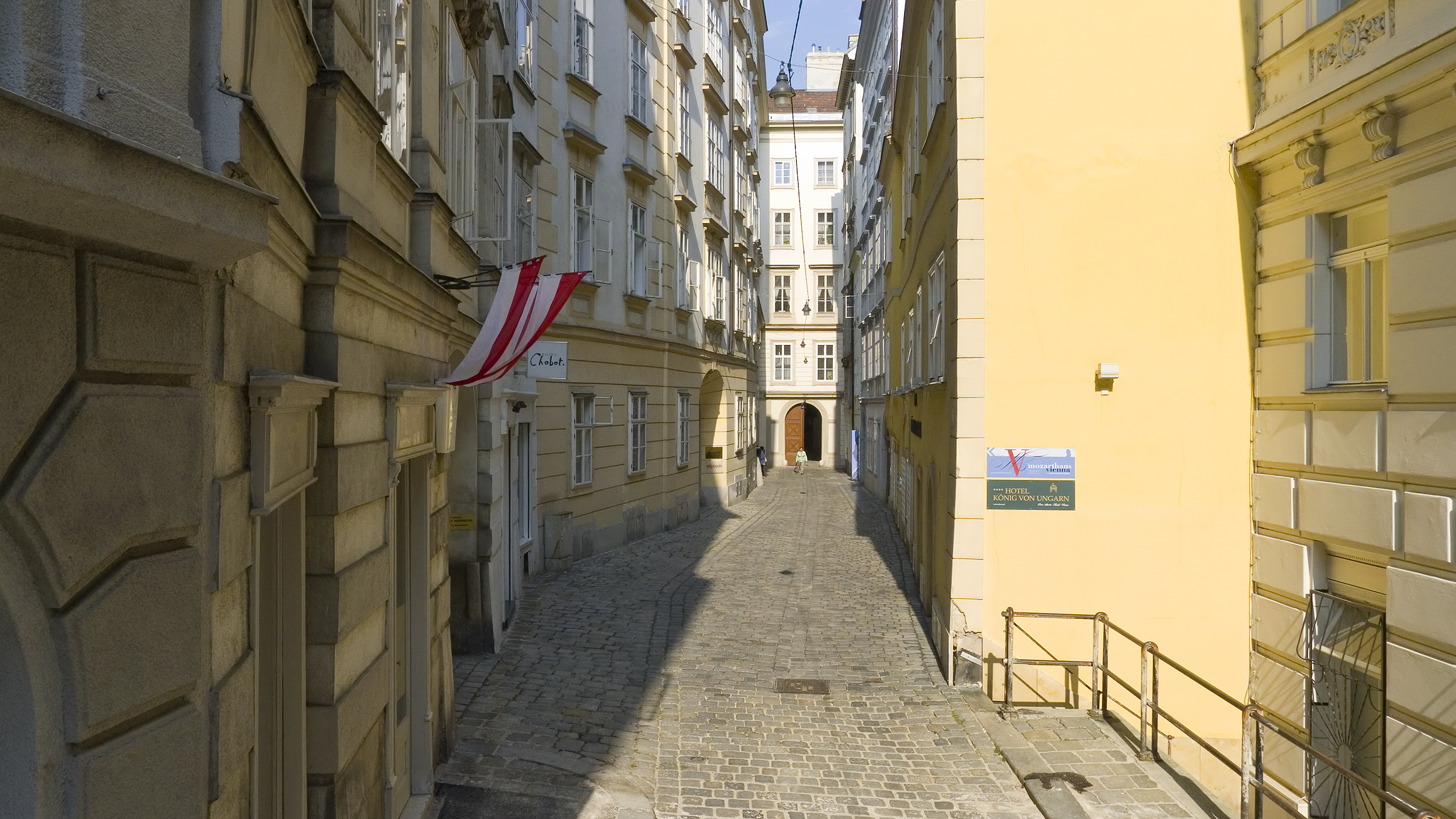 Domgasse in Wien 1 bei Nr. 8 Richtung Nordwesten